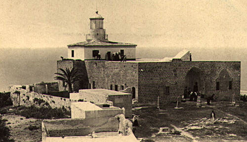 Historical images of Haifa תמונות היסטוריות של חיפה Haifa, The summer residence of Abd Alla Pasha with its adjacent lighthouse. Stela Maris monastery at the end of the 19th century. The lighthouse was later replaced with the one of today מעון הקיץ של עבד אללה פחה והמגדלור לידו, מנזר סטלה מאריס בחיפה בסוף המאה ה-19. מגדלור זה הוחלף מאוחר יותר במגדלור הנמצא שם עכשיו